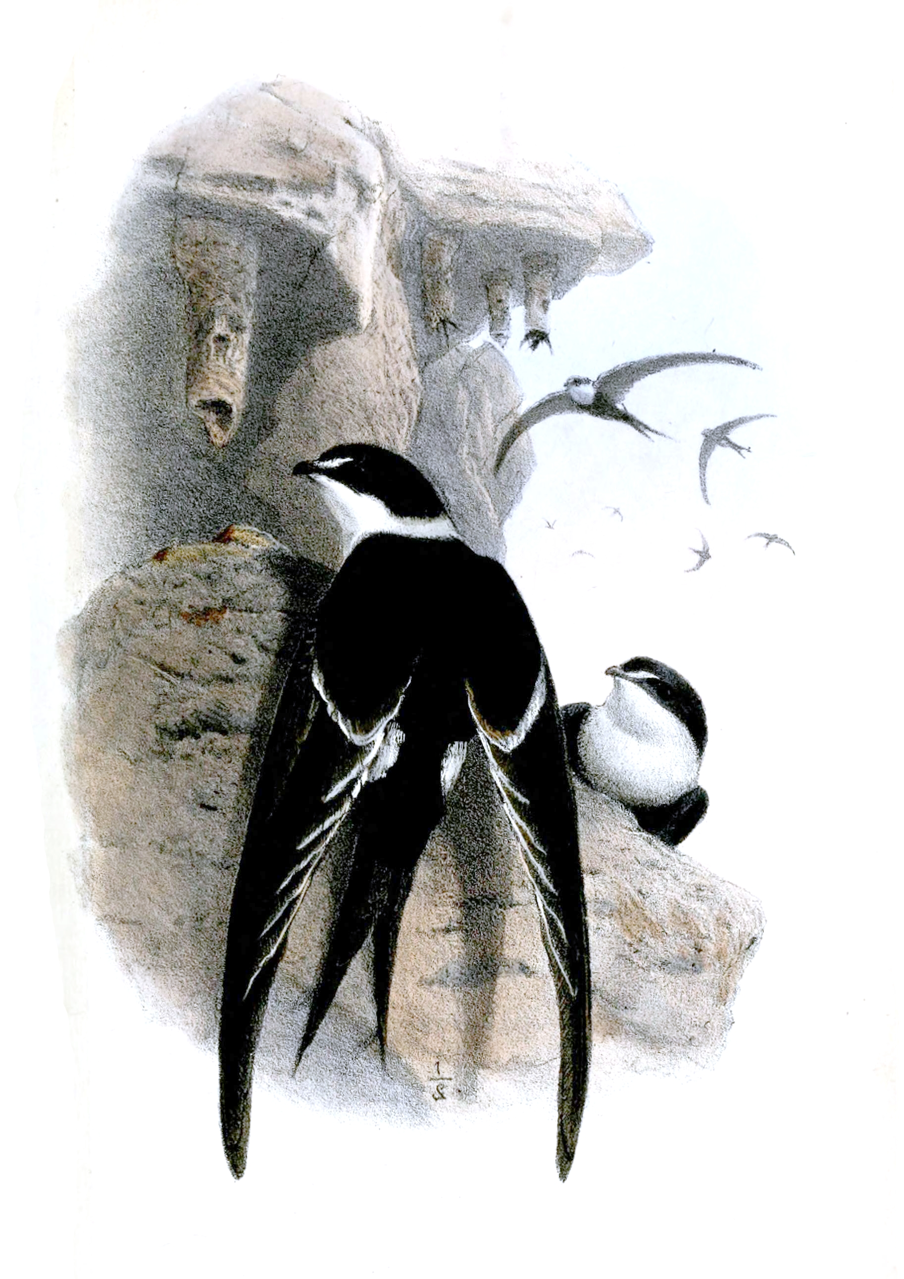 Panyptila sanctijeromae (=P. sanctihieronymi )